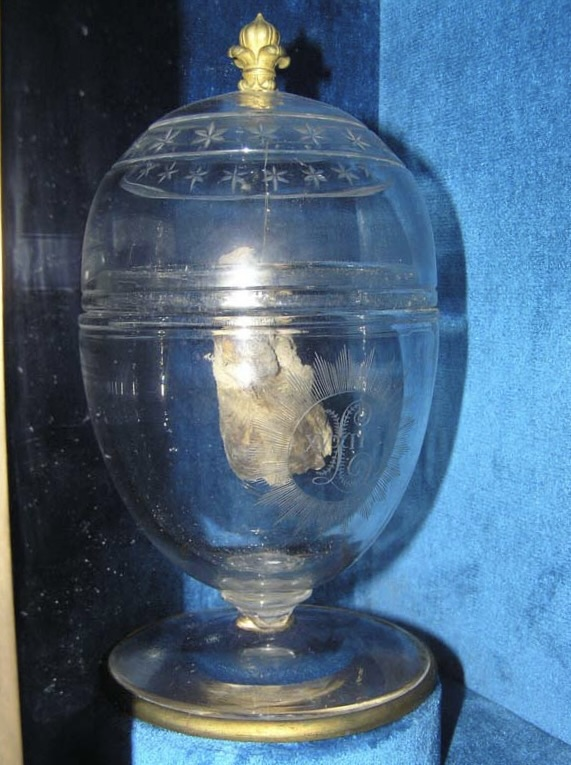 Coeur de Louis XVII, fils de Louis XVI roi de France, mort au temple